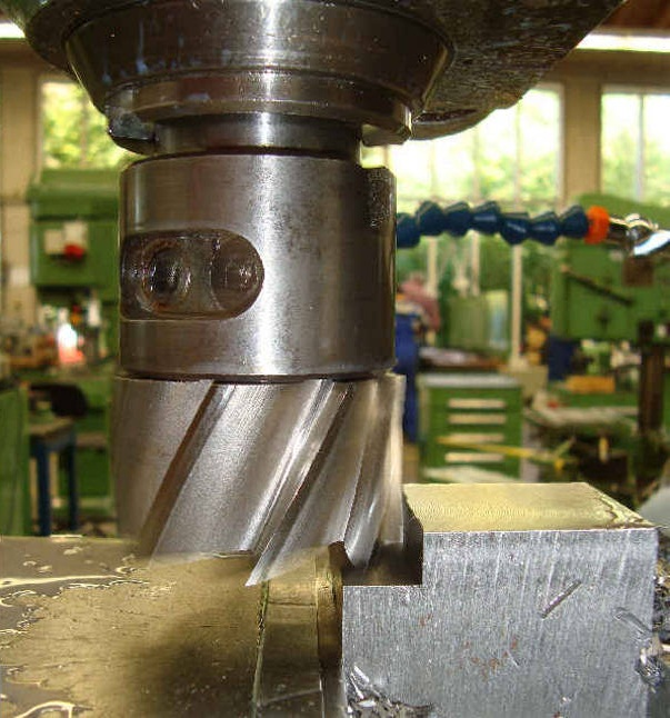 Stirnumfangsfräsen